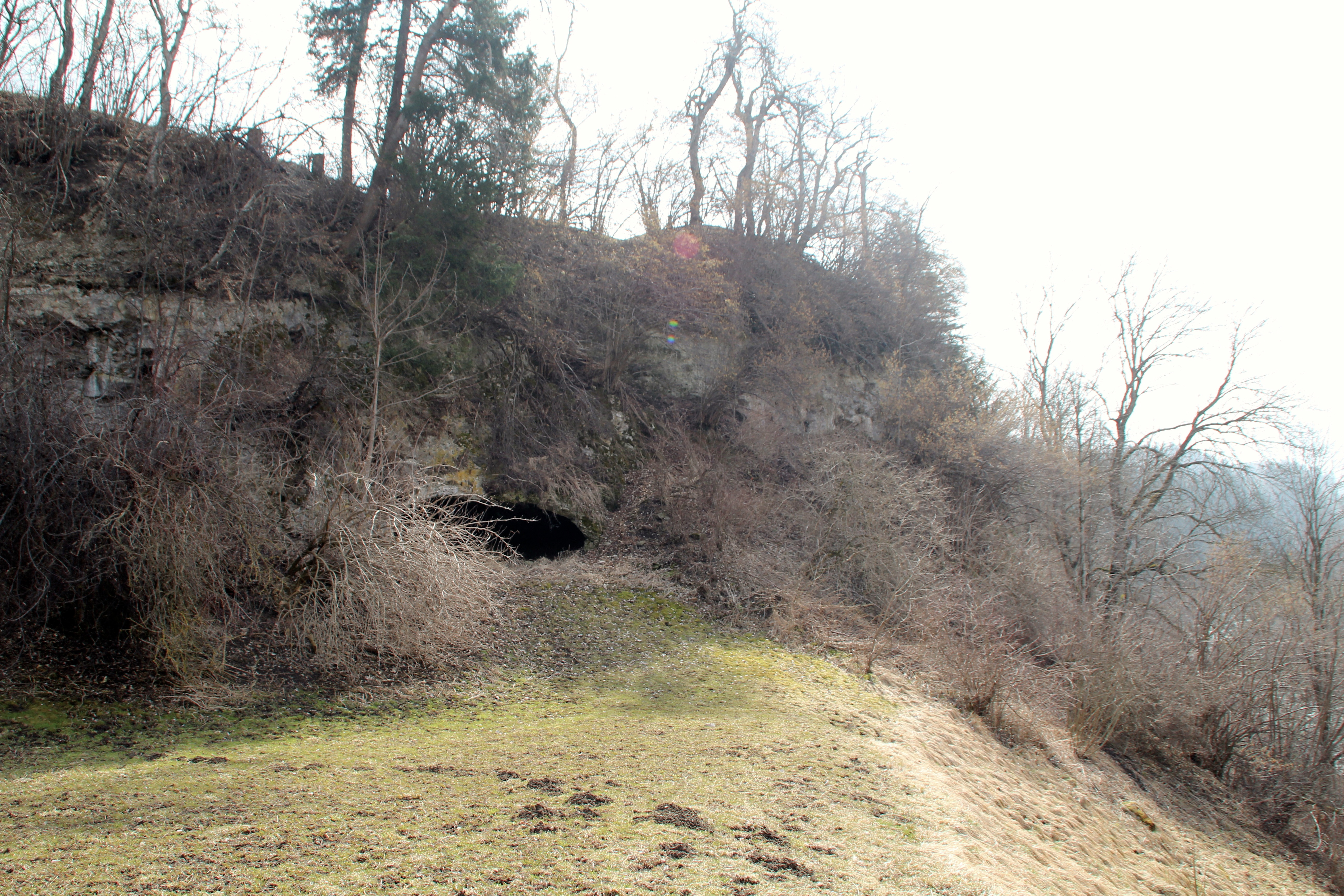 Kulthöhle Zillis Infotafel